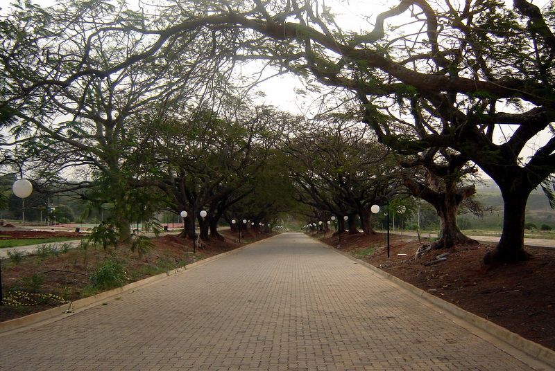 "Caminho dos Flamboyants" no município de Santa Bárbara d'Oeste, São Paulo, Brasil.